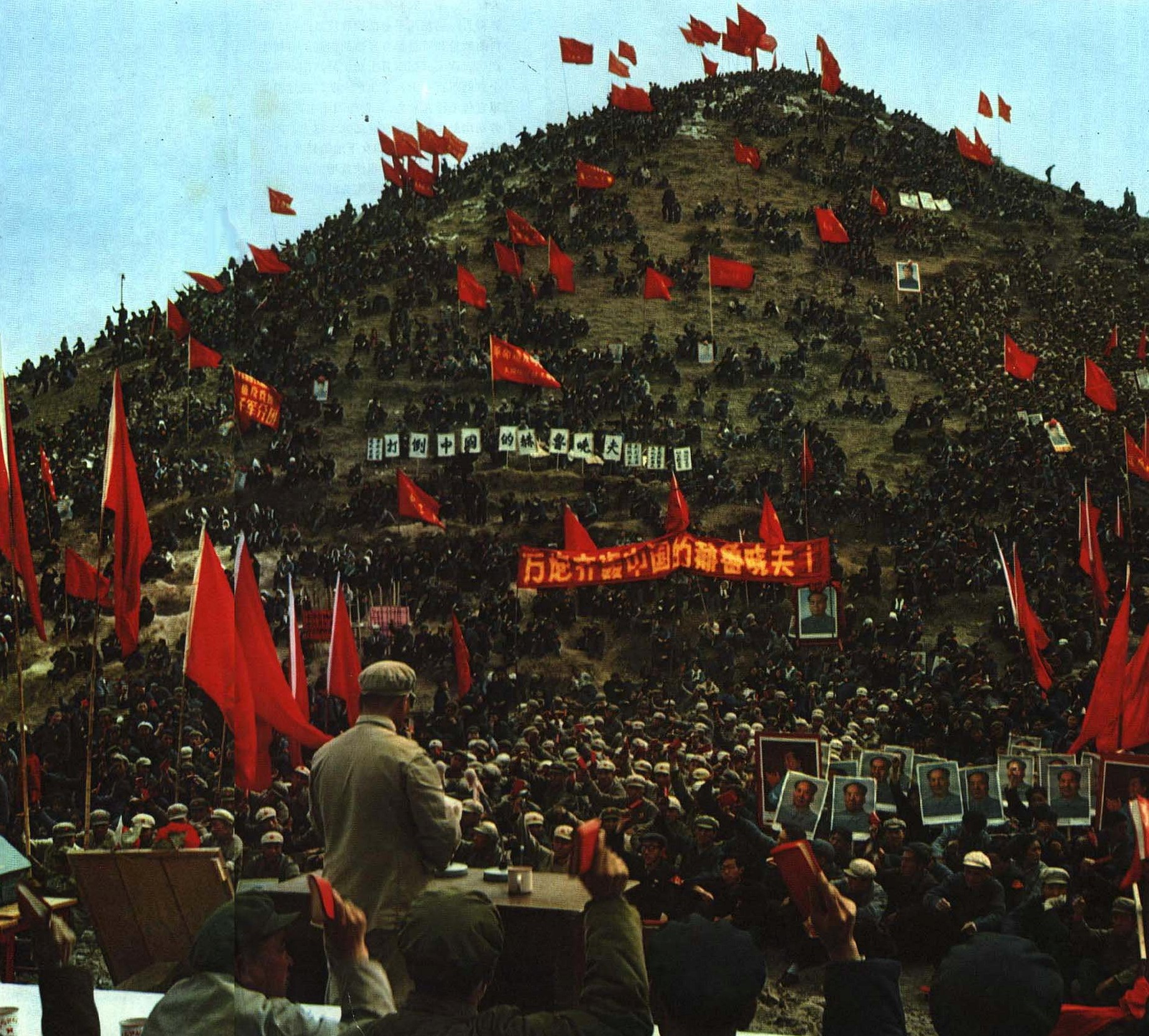 1967-07 1967年 批评刘少奇的群众会议